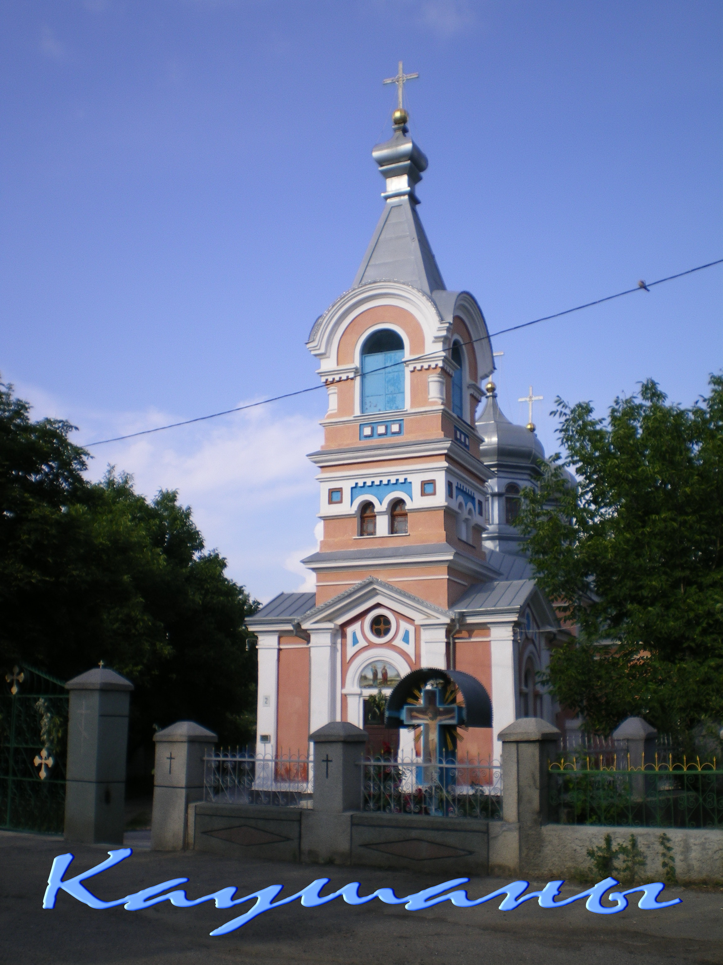 Церковь Петра и Павла Кэушень